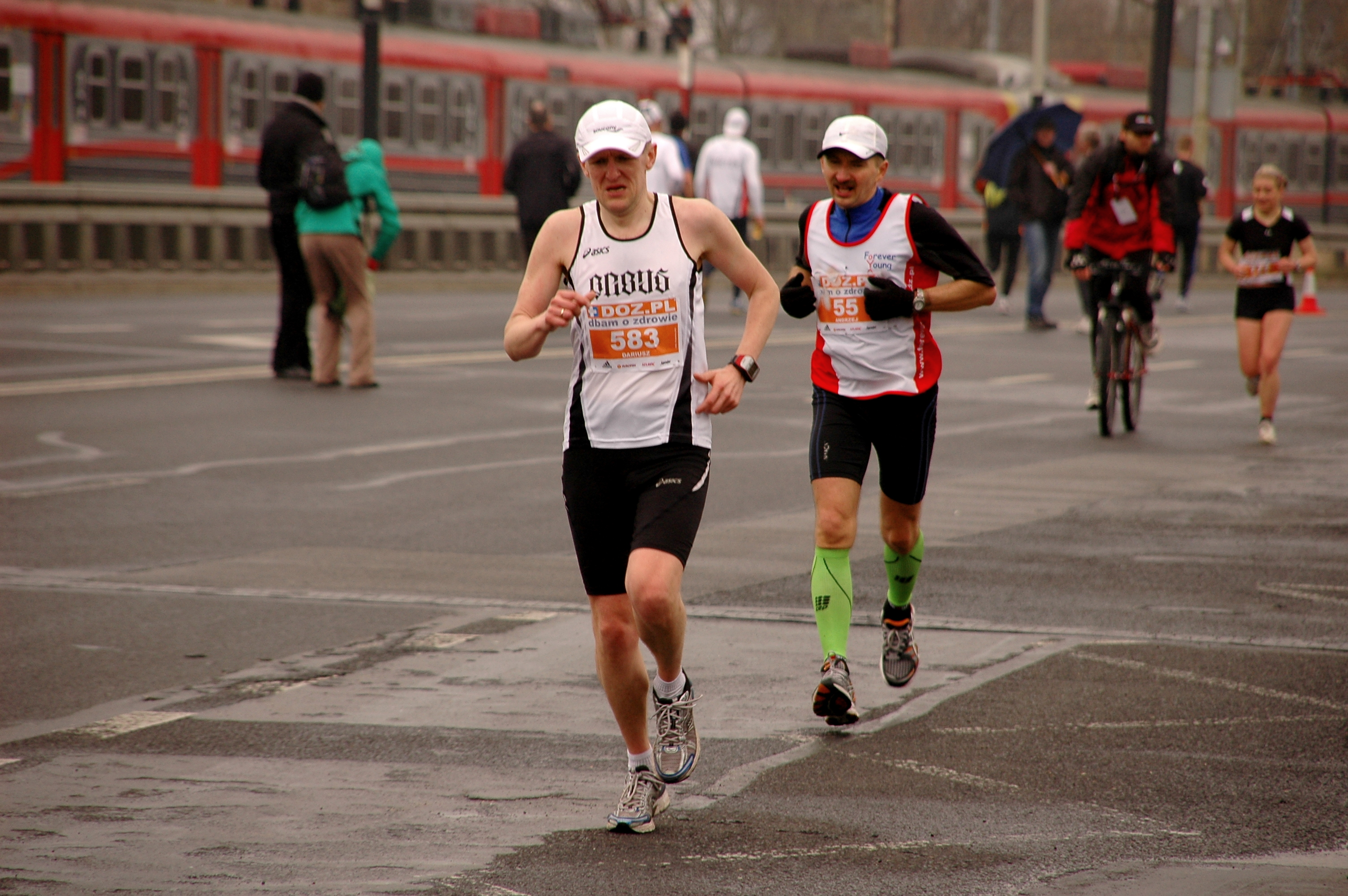 Uczestnicy - ulica Maratońska